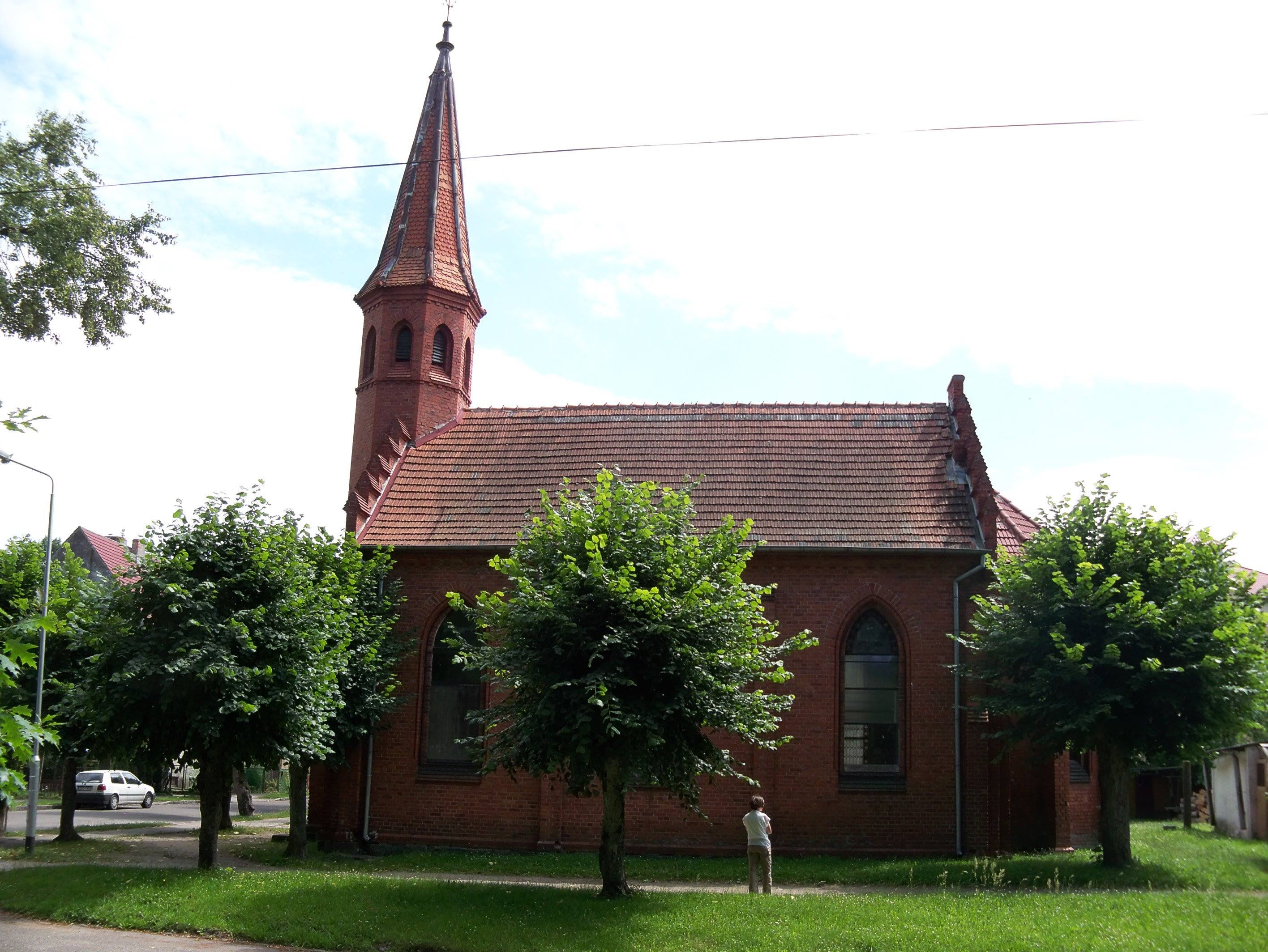 Cerkiew prawosławna, dawniej kościół staroluterański.